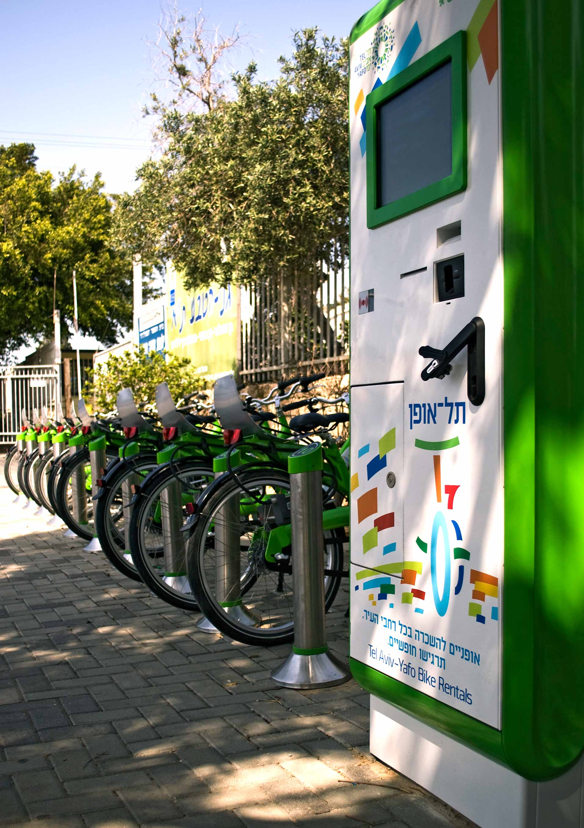 מסוף ואופני "תל-אופן" ברחוב הרצל בתל אביב